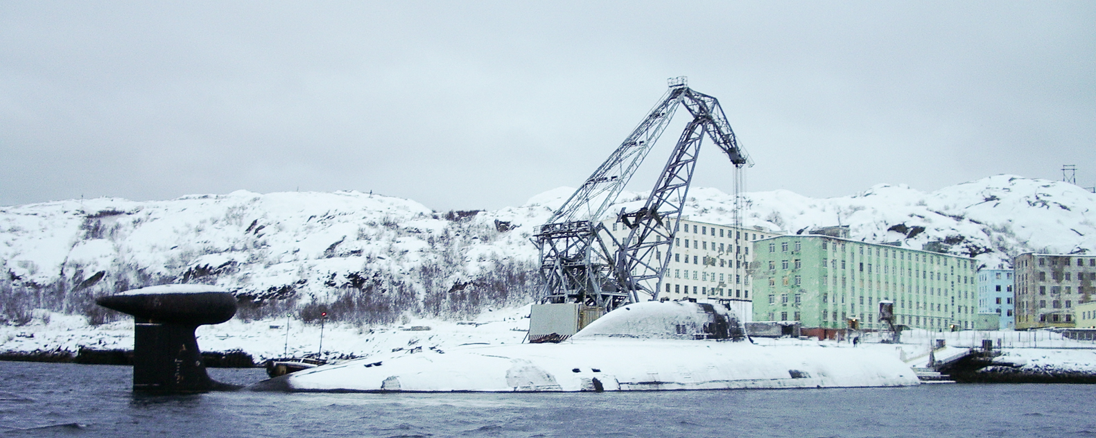 У причала Гаджиево